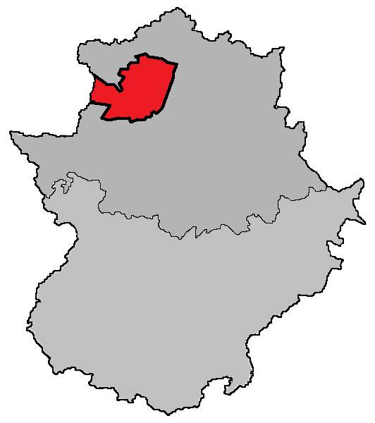 Localización de las Vegas del Alagón, comarca de Extremadura, España (adaptación del mapa Image:Valle del jerte en extremadura.png ya existente en commons)